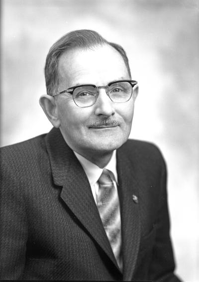 Senator Louis E. Hofmeister, 1959